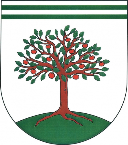 znak, Jabloňov, okres Žďár nad Sázavou